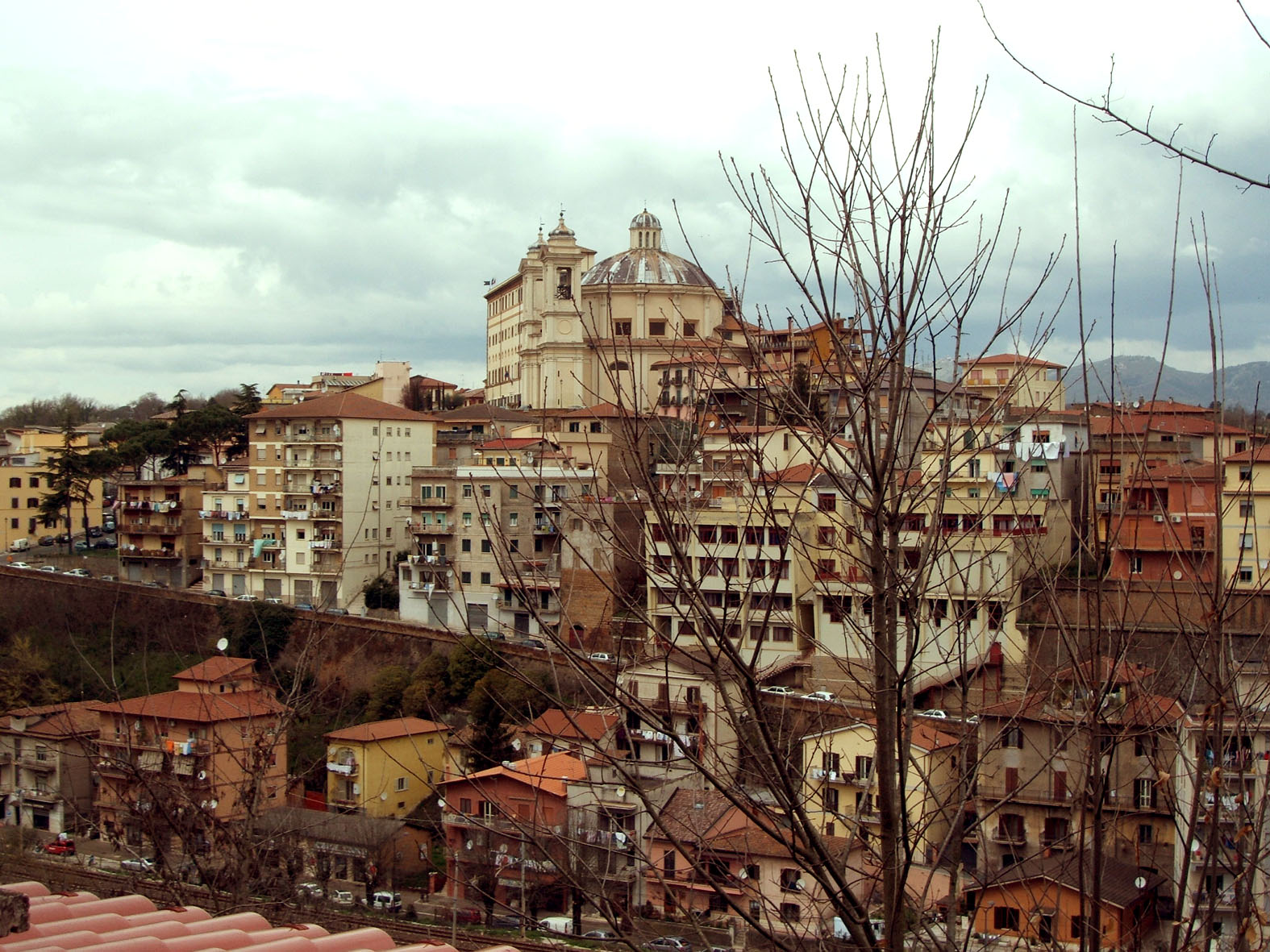 Valmontone, Valle del Sacco RM